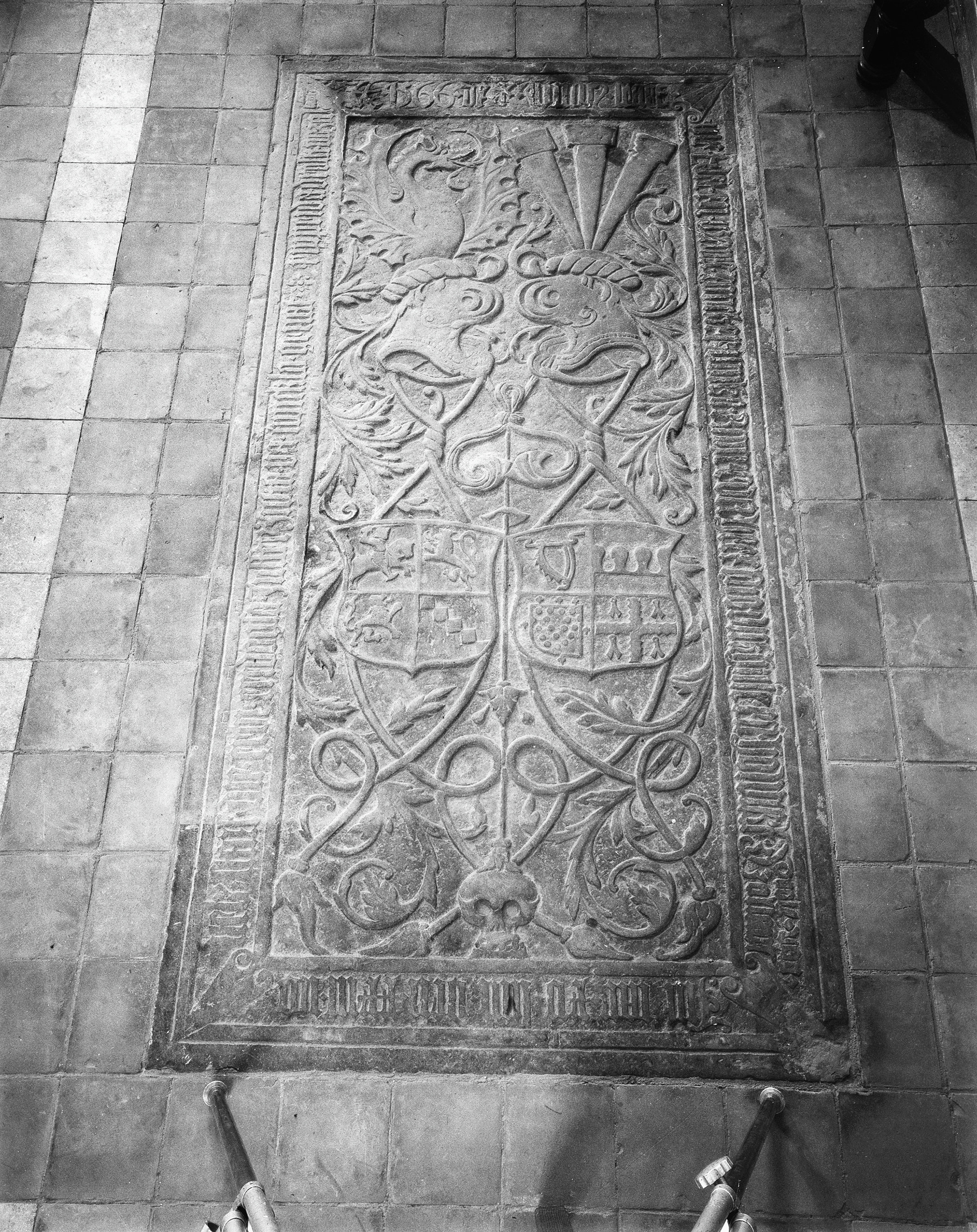 Nederlands Hervormde Kerk: grafsteen van Uniko Ripperda pl.m.1566